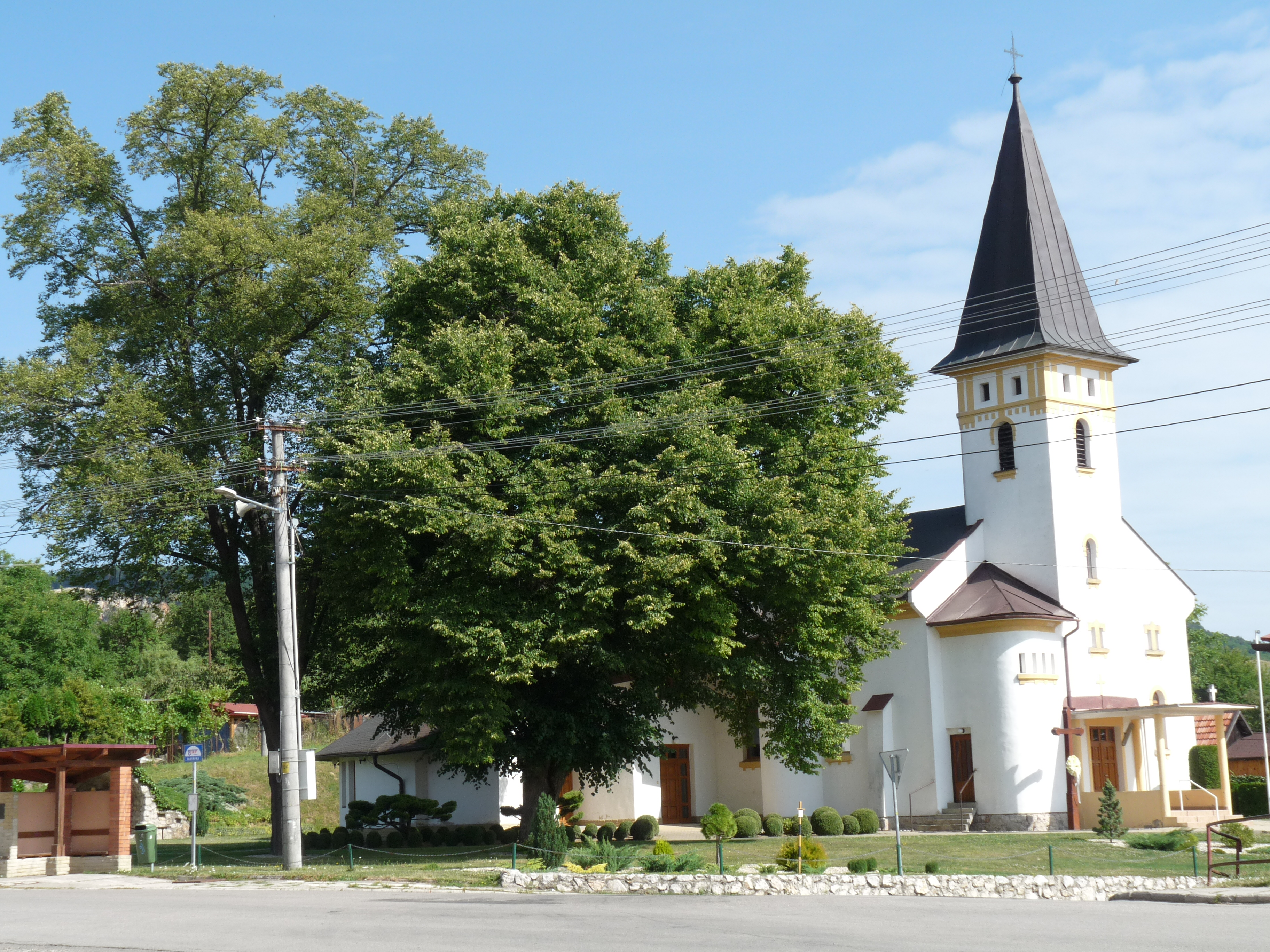 Kostol v Trenčianskom Jastrabí